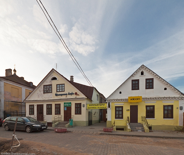 Забудова Навагрудка